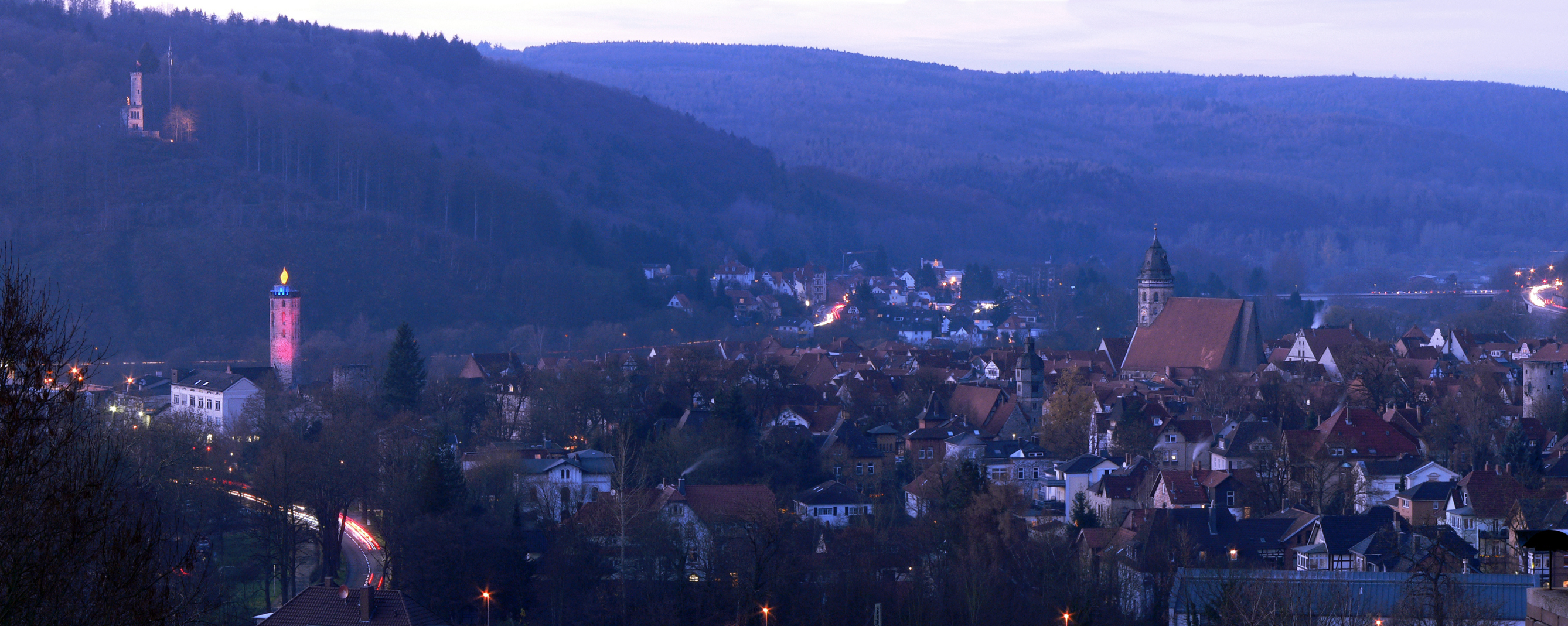 Hann. Münden vom Kattenbühl zur Weihnachtszeit mit Fährenpfortenturm und Tilly-Schanze